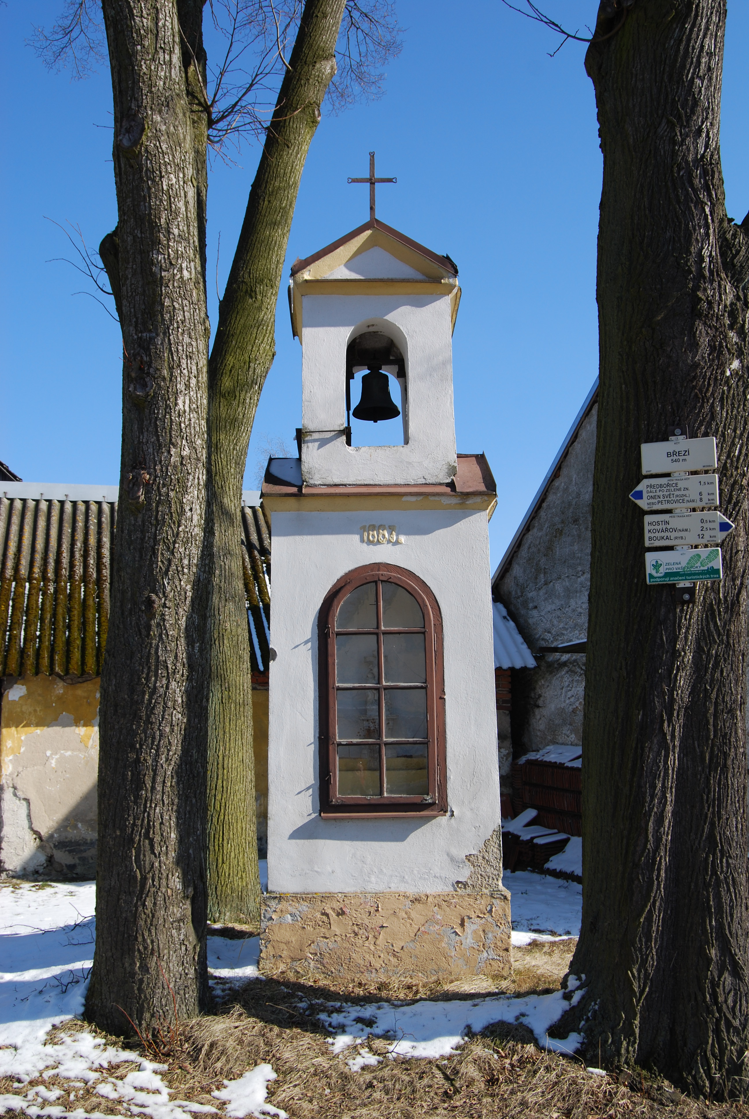 Březí (Kovářov). Okres Písek. Kaple Panny Marie v obci z roku 1887. Česká republika.